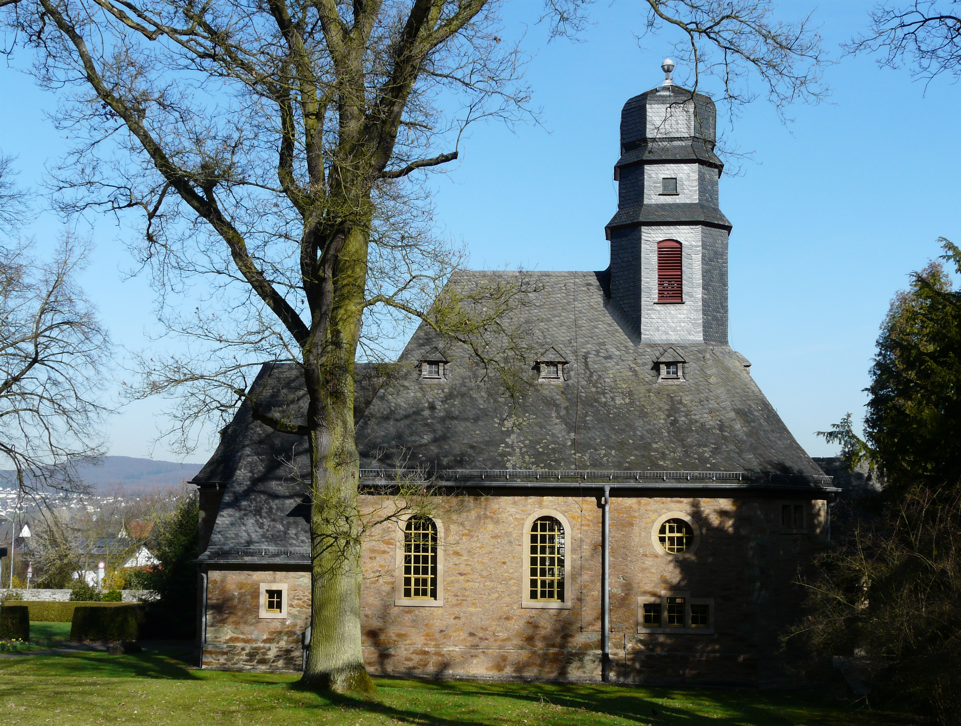 Evangelische Kirche in Solms-Albshausen (Hessen)